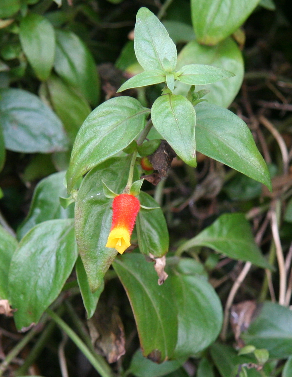 Manettia luteorubra im Botanischen Garten Dresden